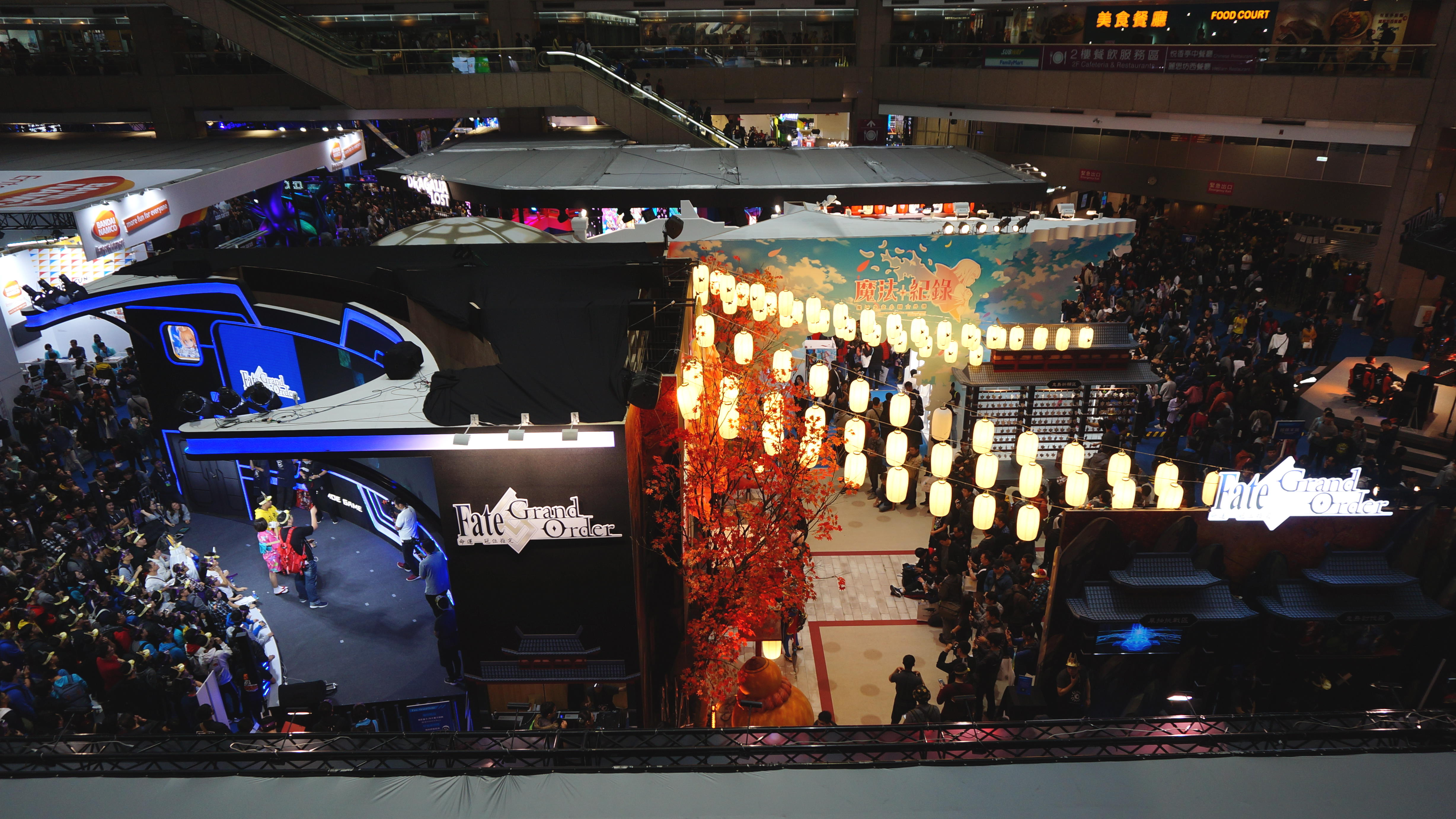 中文（台灣）: 2019台北國際電玩展世貿一館展區，小萌科技攤位，主打《命運－冠位指定》與《魔法紀錄 魔法少女小圓外傳》。